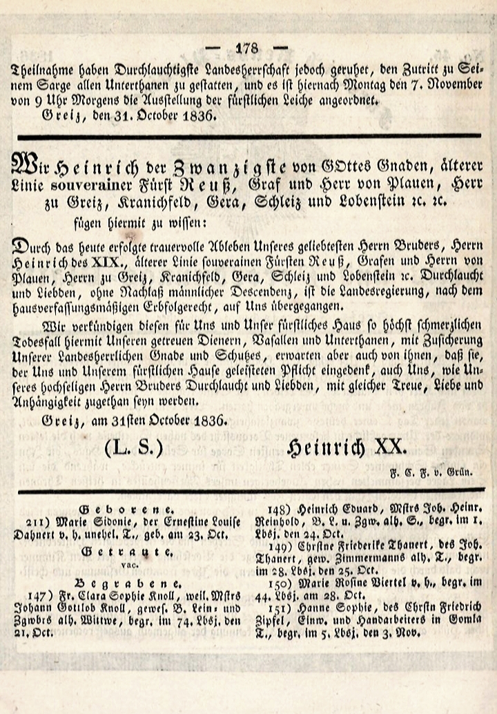 Zeitungsanzeige von 1836 bezüglich der Regierungsübernahme durch Heinrich XX., von Gottes Gnaden, älterer Linie souveräner Fürst Reuß, Graf und Herr von Plauen, Herr zu Greiz, Kranichfeld, Gera, Schleiz und Lobenstein etc. etc. am 31. Oktober 1836